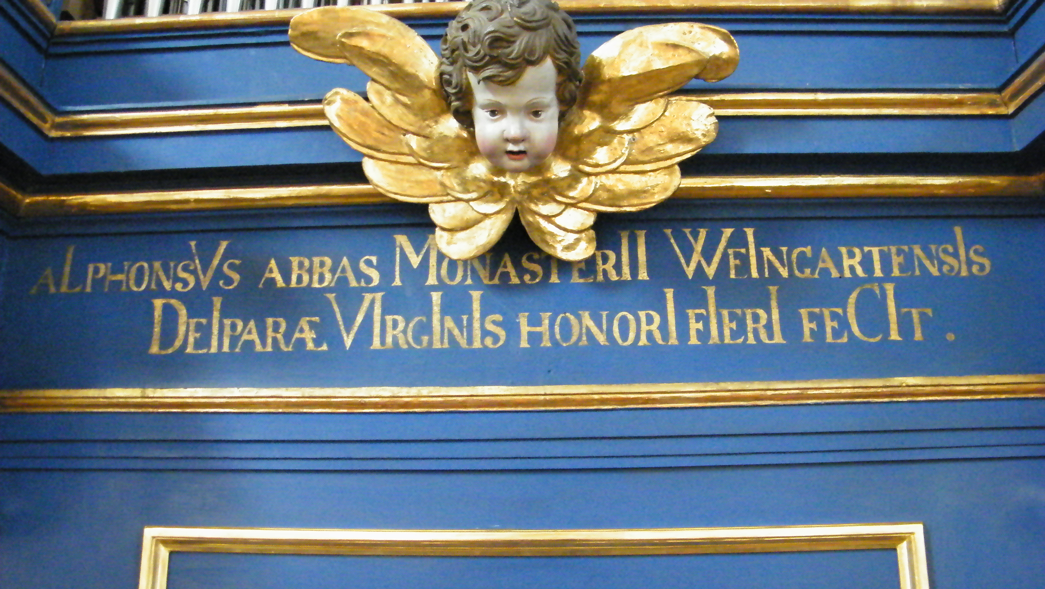 Elegisches Chronodistichon: ALPHONSVS ABBAS MONASTERII WEINGARTENSIS DEIPARÆ VIRGINIS HONORI FIERI FECIT (Alfons, Abt des Klosters Weingarten, ließ [das] zur Ehre der jungfräulichen Gottesgebärerin errichten).